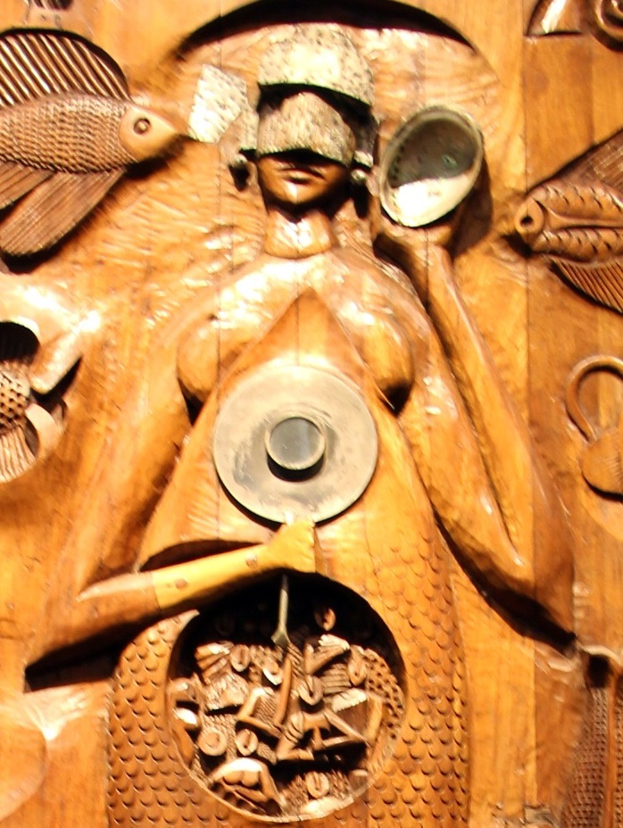 Recorte de fotografia da Escultura de Iemanjá de Carybé.